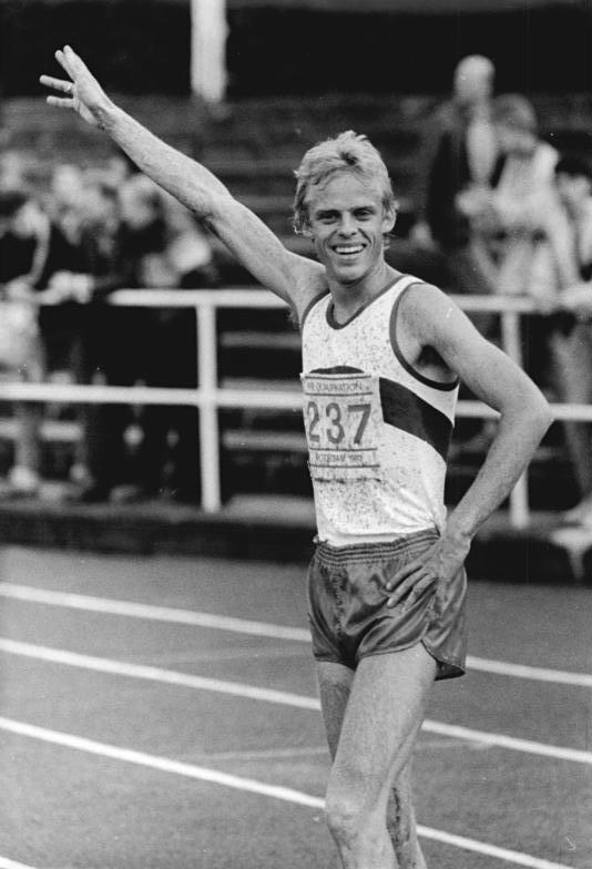 Hans-Jörg Kunze ADN-ZB Oberst 6.6.87-wo-Potsdam: Leichtathletik-WM-Qualifikation- Den 10 000-m-Lauf der Männer, als DDR-Meisterschaft ausgeschrieben, gewann am 5.6.87 der Rostocker Hans-Jörg Kunze in 27:39,60 min.